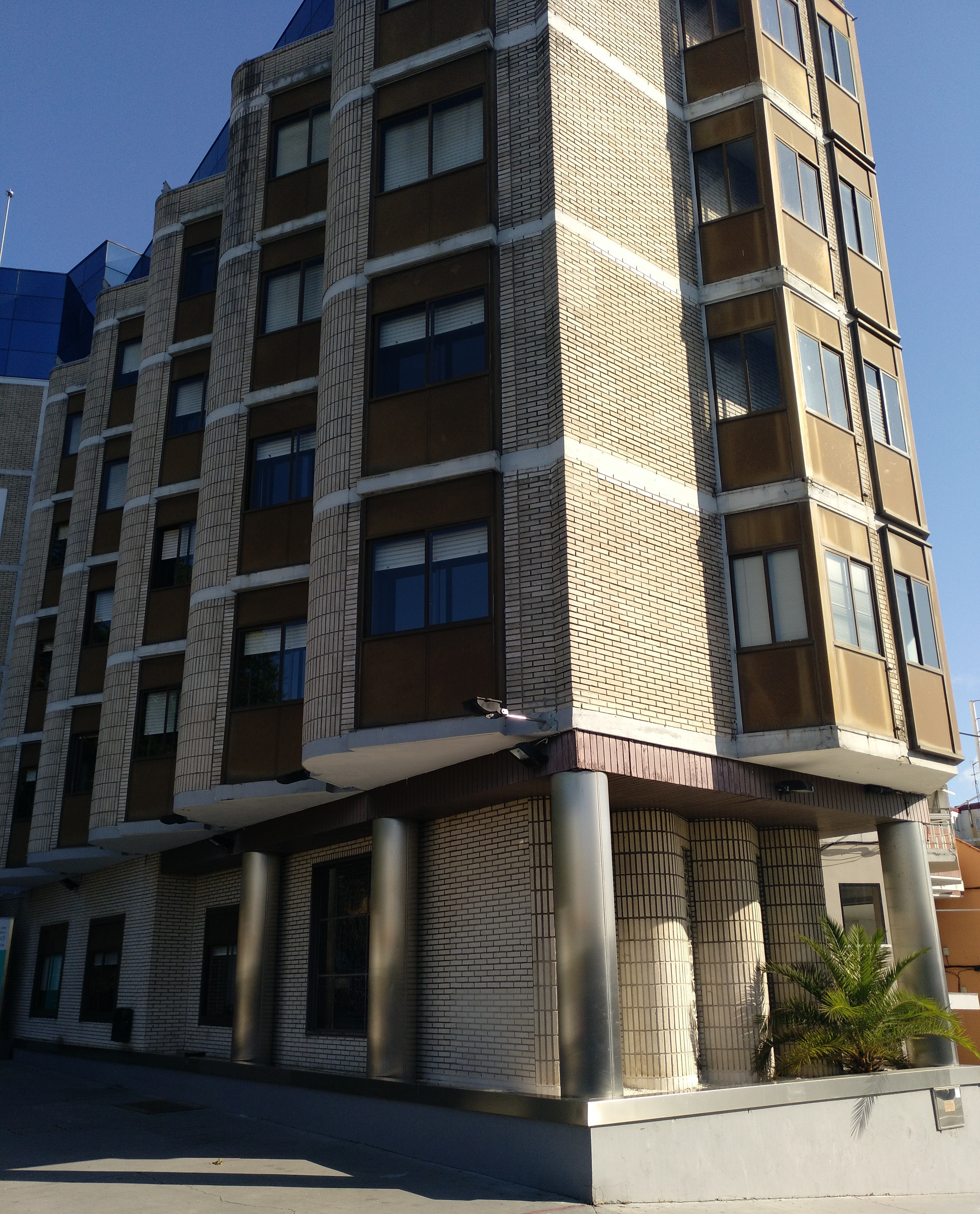 Centro de Daño Cerebral y Neurociencias Miguel Domínguez (antigo Sanatorio Nuestra Señora de La Meced), en Andurique, San Salvador de Poio